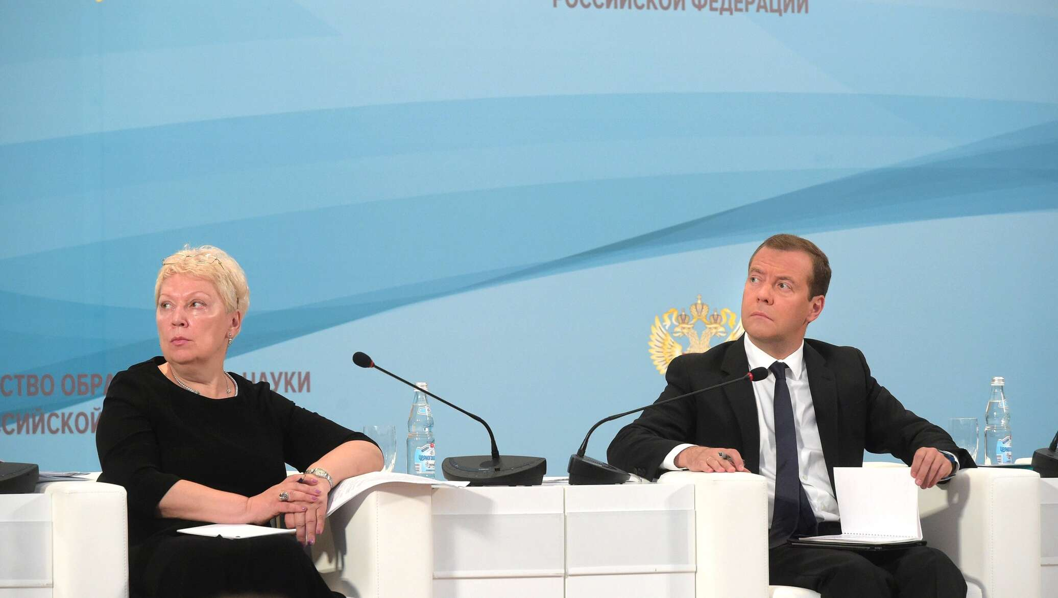 Всероссийское августовское совещание педагогических работников 19–20 августа 2016 года в Москве. Премьер-министр РФ Д. А. Медведев и министр образования РФ О. Ю. Васильева.